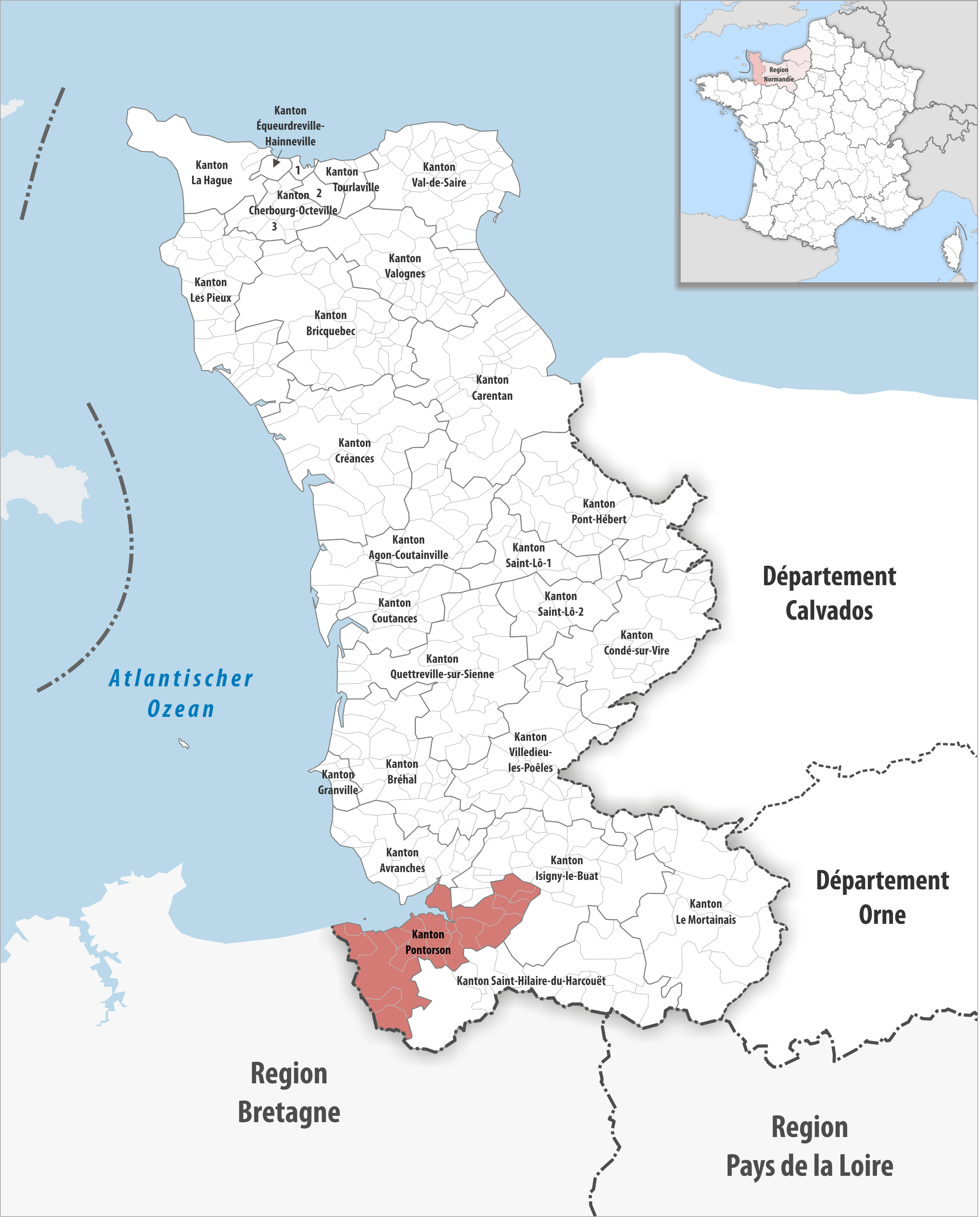 Lage des Kantons Pontorson